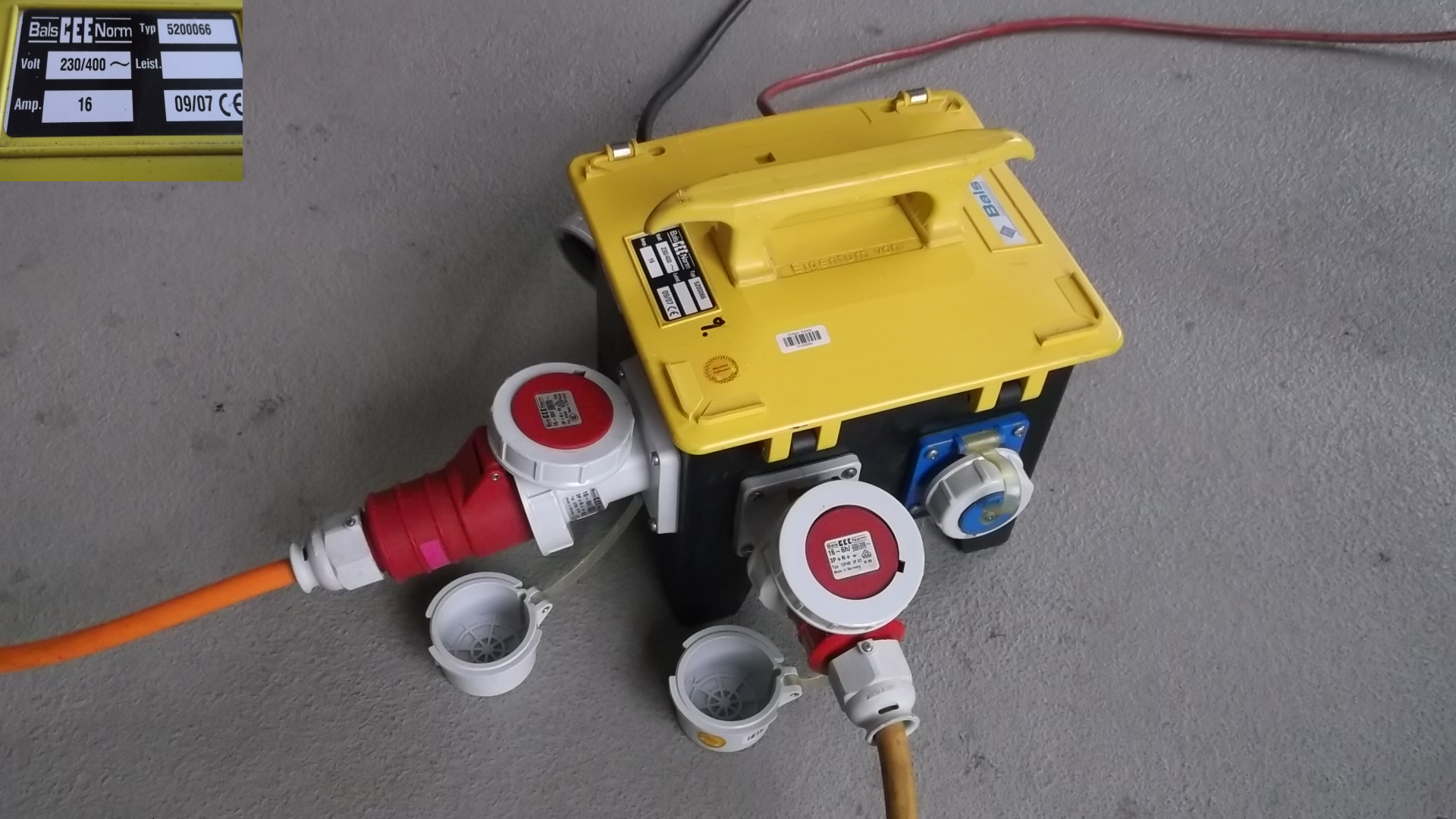 mobiler CEE u. Schuko Verteilerkasten 400-230V 16A mit eingebautem Fehlerstromschutzschalter und IP67 Steckvorrichtungen, einem hohen Schutzgrad für den Außenbereich, der Fa. Bals